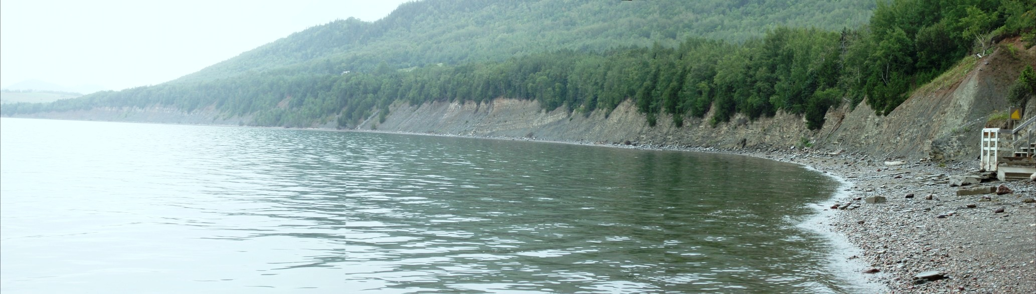 Falaise du Parc national de Miguasha (Québec), dans laquelle affleurent les couches dévoniennes riches en fossils de poisson. Cliff of the Miguasha National Park (Québec), with the Devonian beds that are rich in fish fossils.